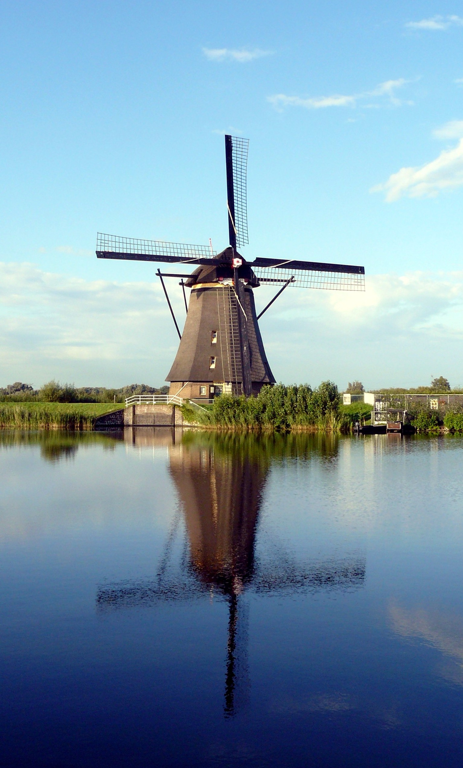 Eine der insgesamt 19 Mühlen bei Kinderdijk im Abendlicht